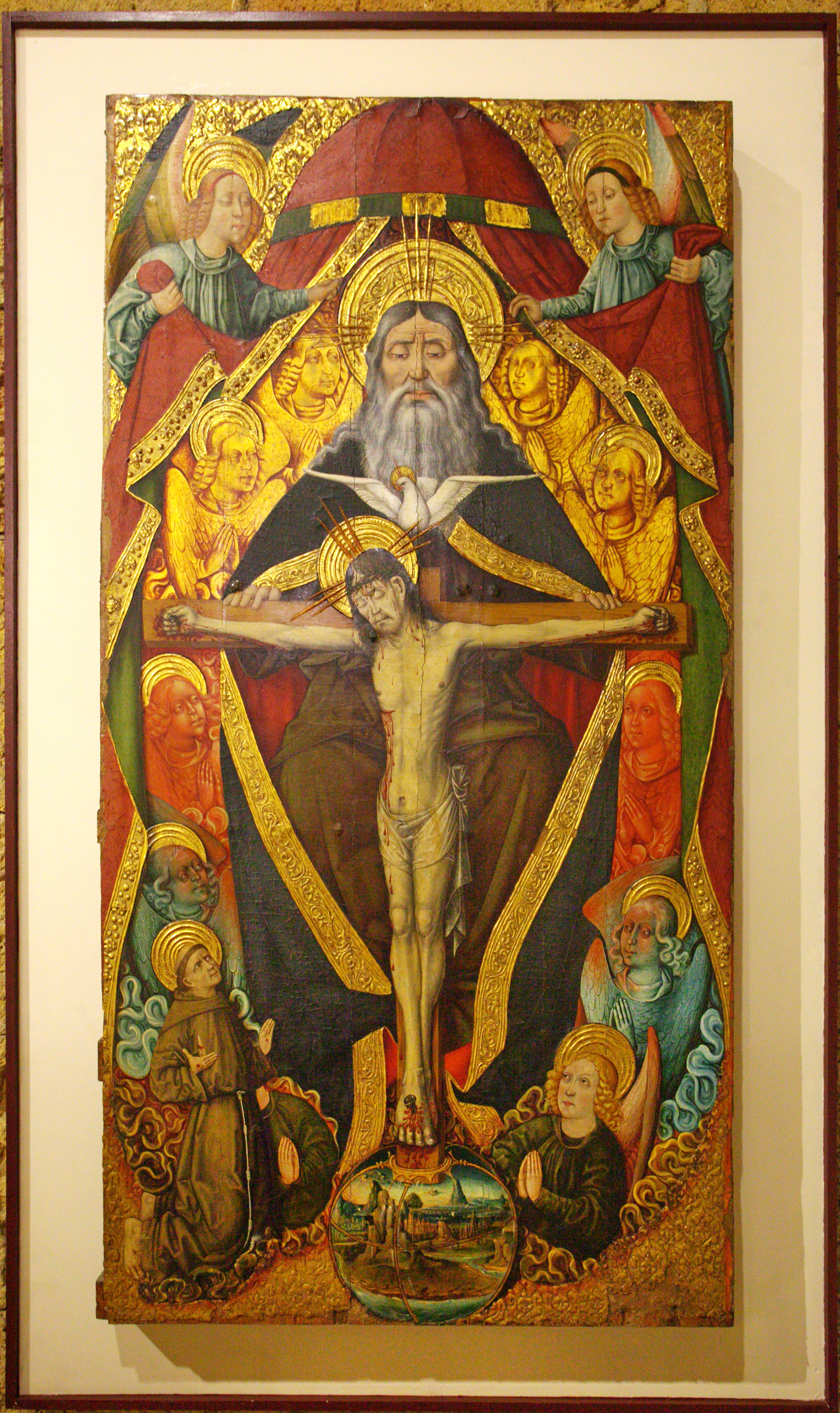 El lienzo muestra a San Francisco de Asís contemplando a las tres personas de la Santísima Trinidad.